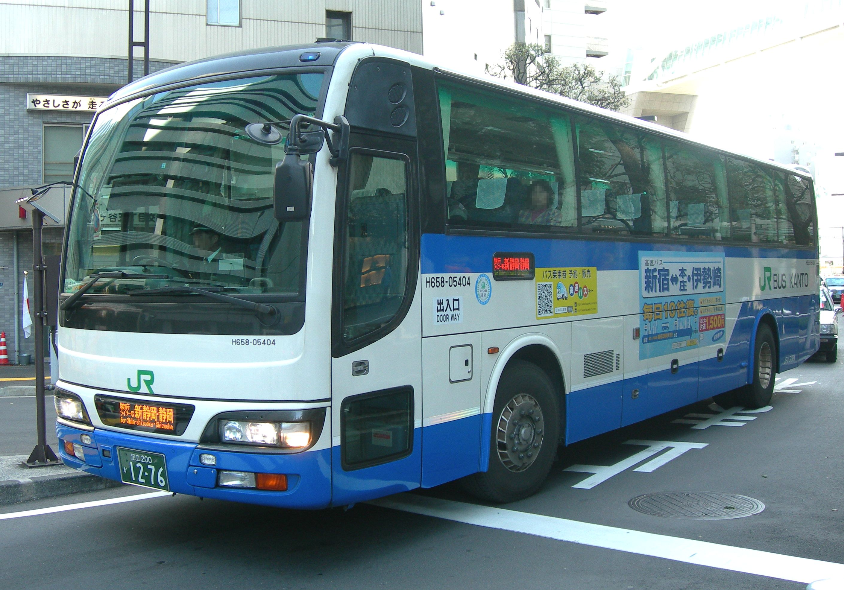 JRバス関東 駿府ライナー